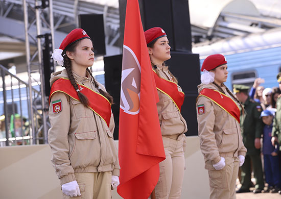 Сирийский перелом в Казани